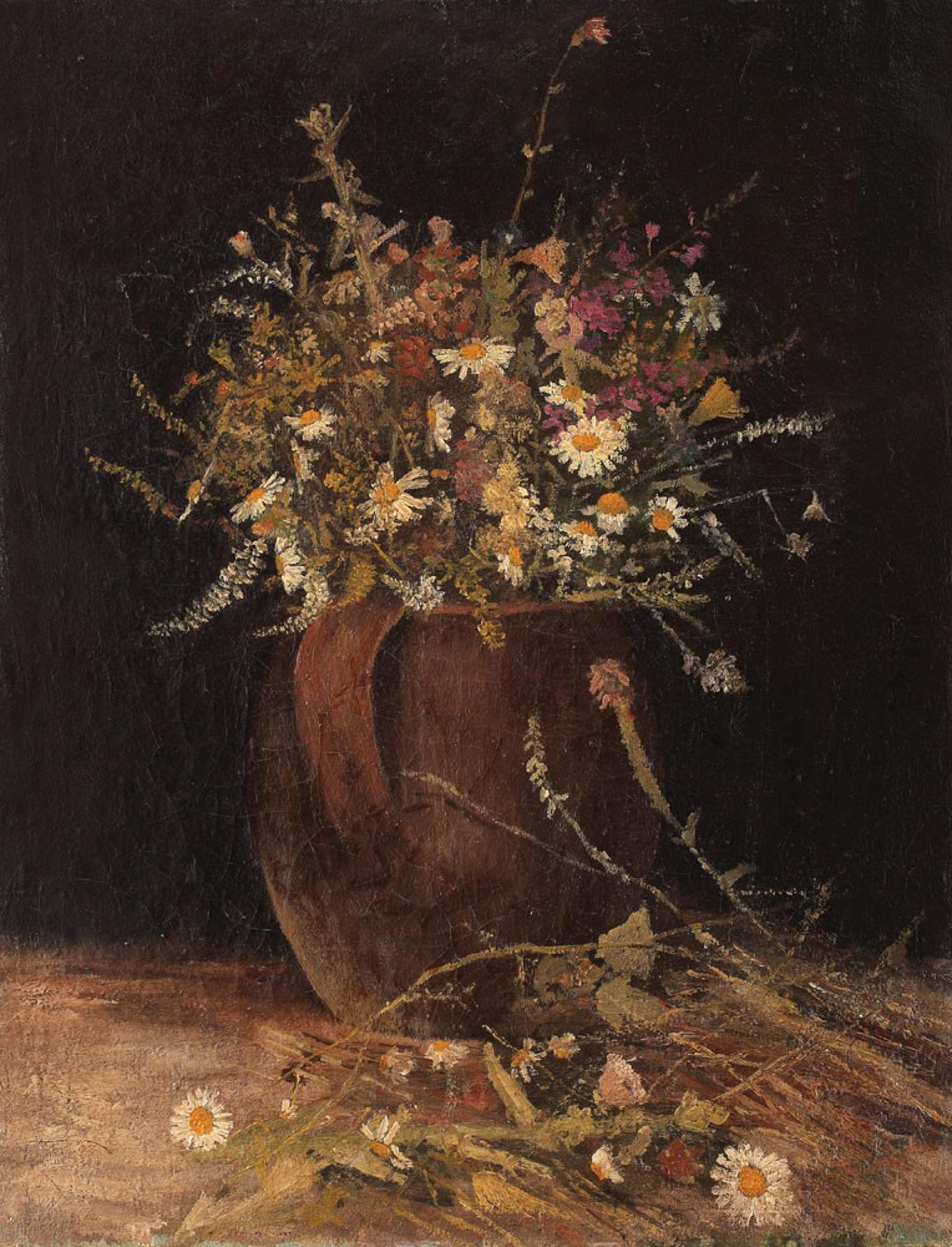 Ulcică cu flori de câmp, ulei pe pânză, 65 × 50 cm